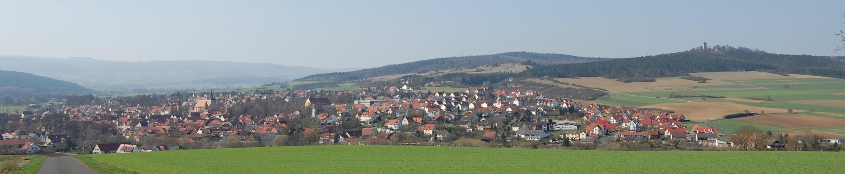 Ostheim vor der Rhön (Gesamtansicht 2011)